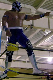 Ultimo Guerrero.